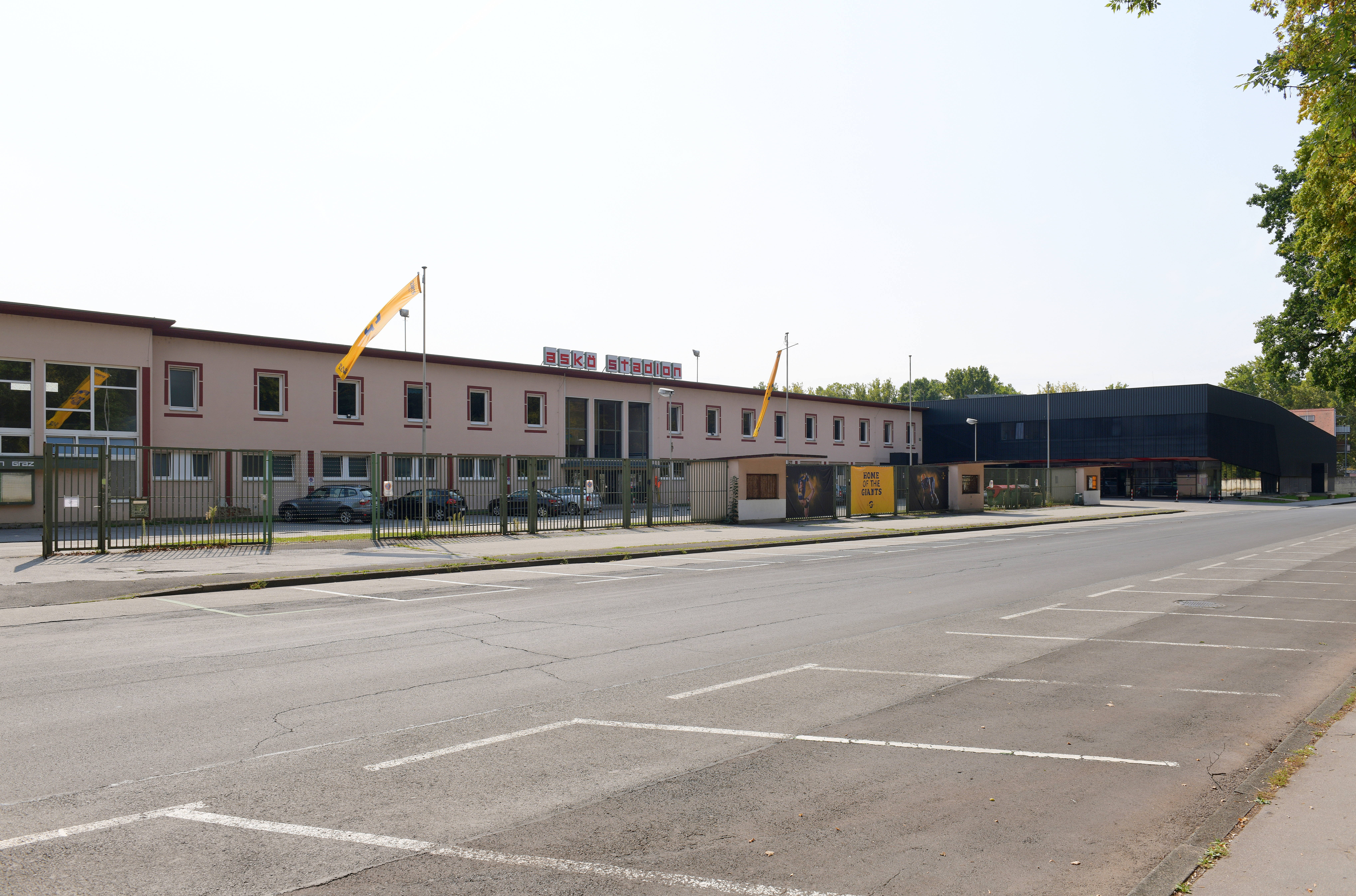 Verwaltungsgebäude und Halle A des ASKÖ Steiermark in der Schloßstraße 20 in Graz Eggenberg